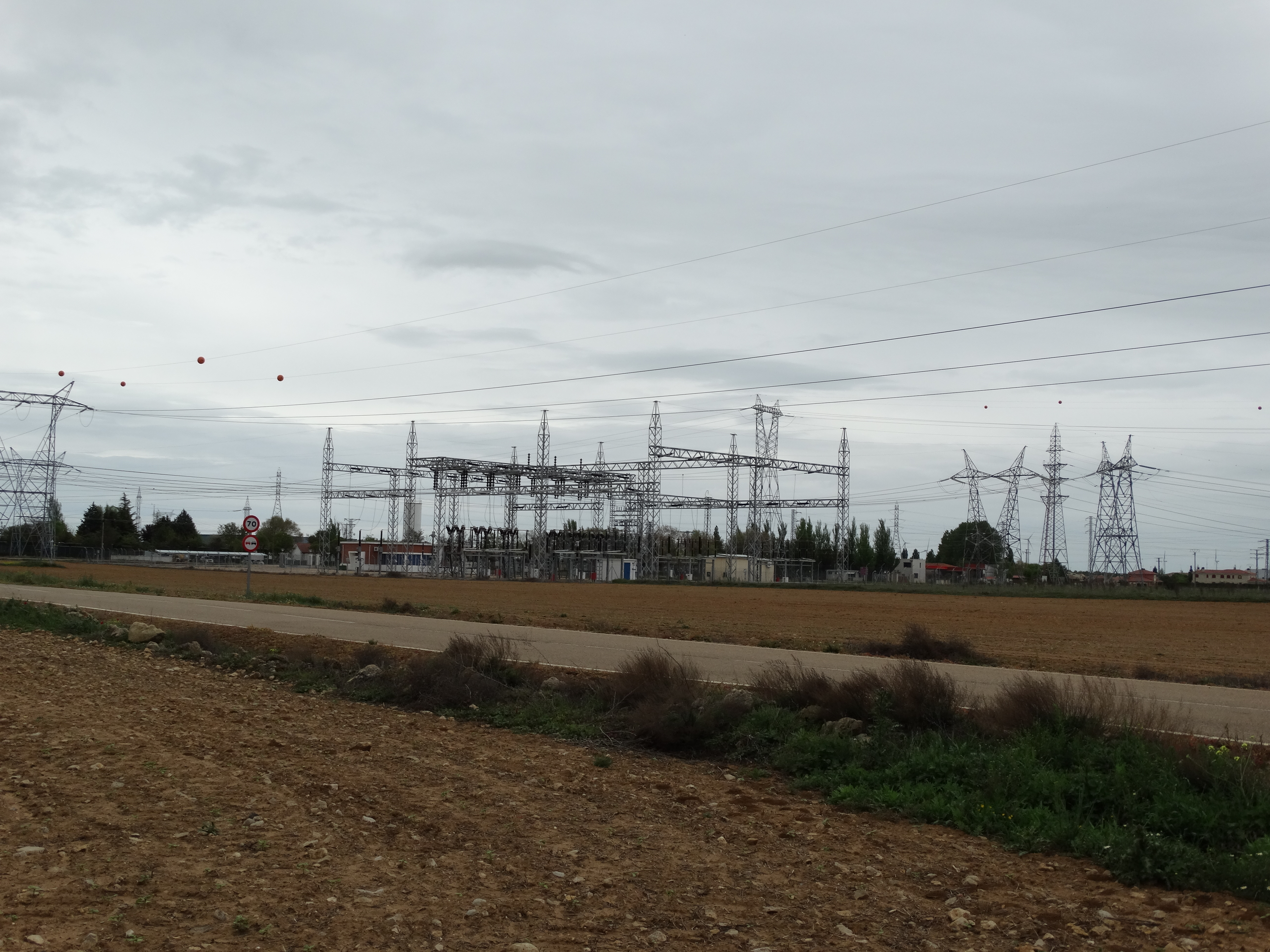 Paisaje castellano con las instalaciones de la subestación de La Mudarra (Valladolid, España) perteneciente a la Red Eléctrica de España.